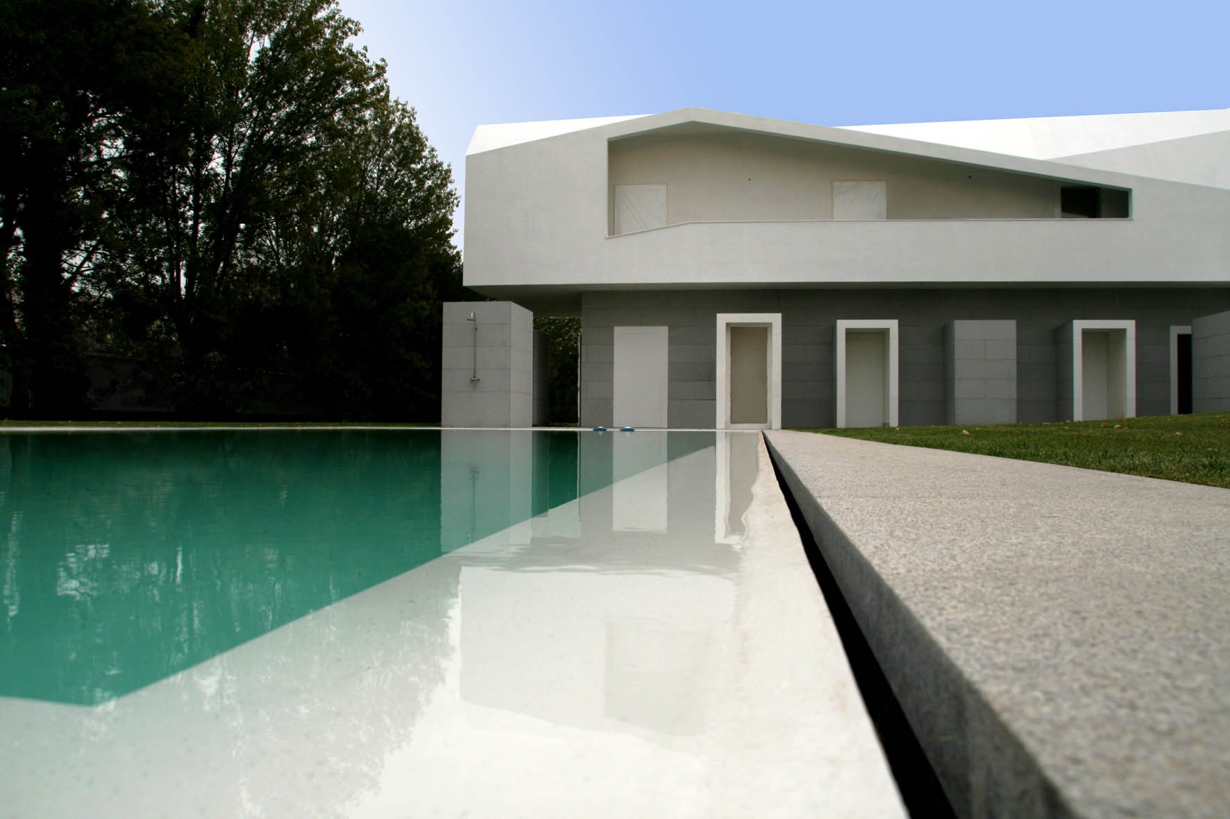 Fez House Álvaro Leite Siza Vieira